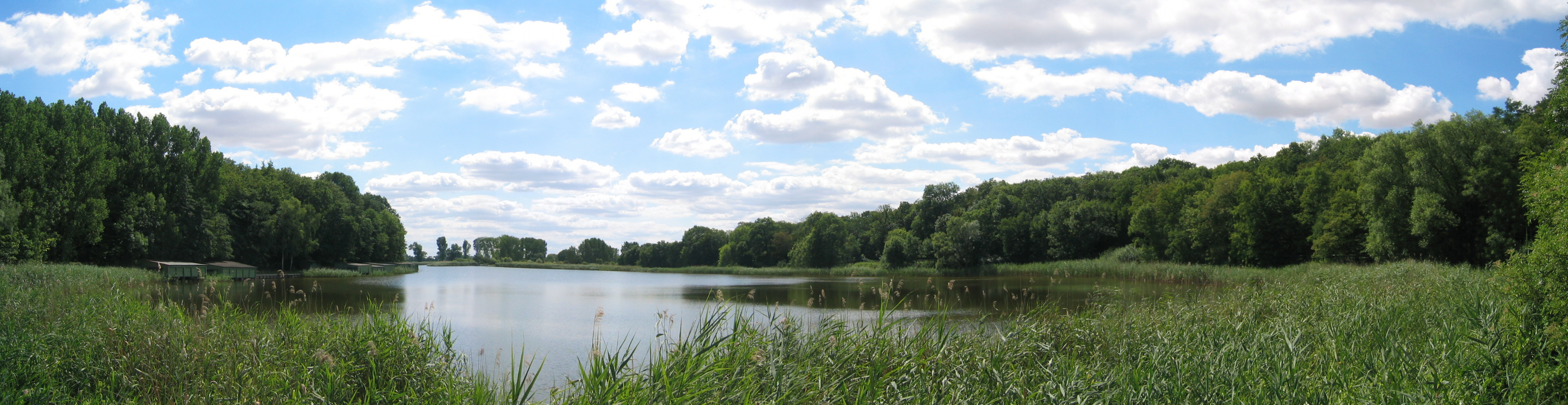 Der Schloßsee in Penkun (Uecker-Randow).